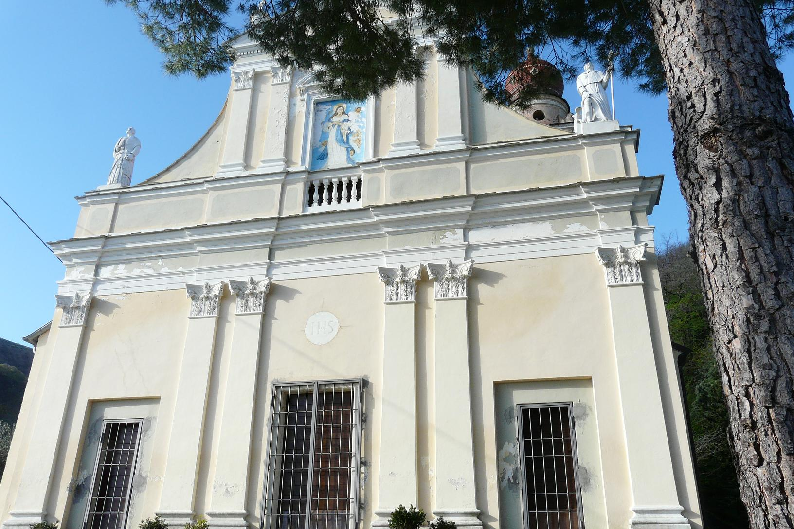 Chiesa di Santa Maria del Bosco, Stellanello, Liguria, Italia